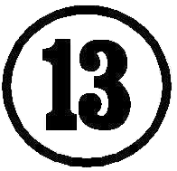 1º escudo do Treze Futebol Clube